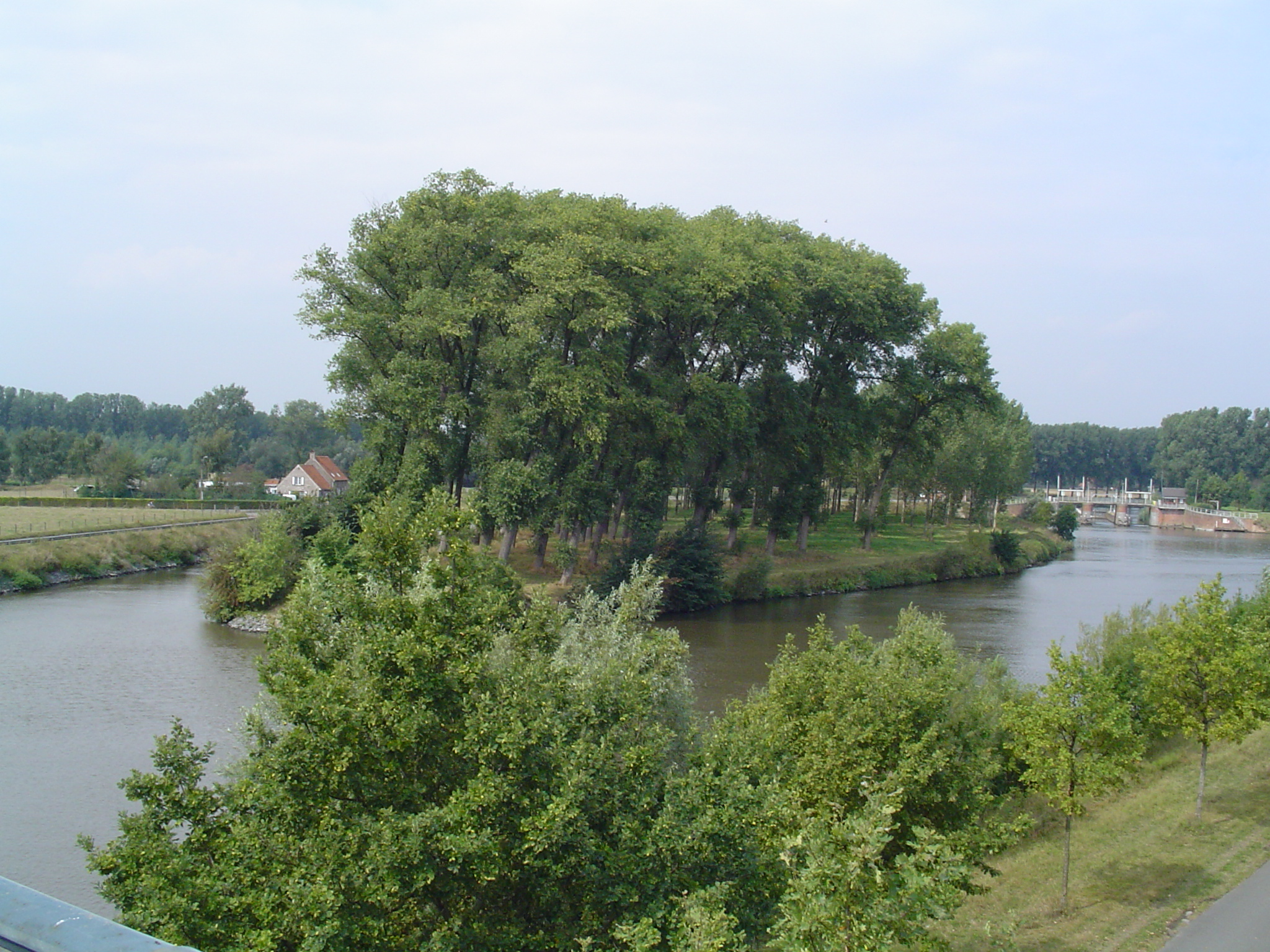 Eiland in het Schipdonkkanaal te Merendree, vooraleer de bomen verdwenen zijn.